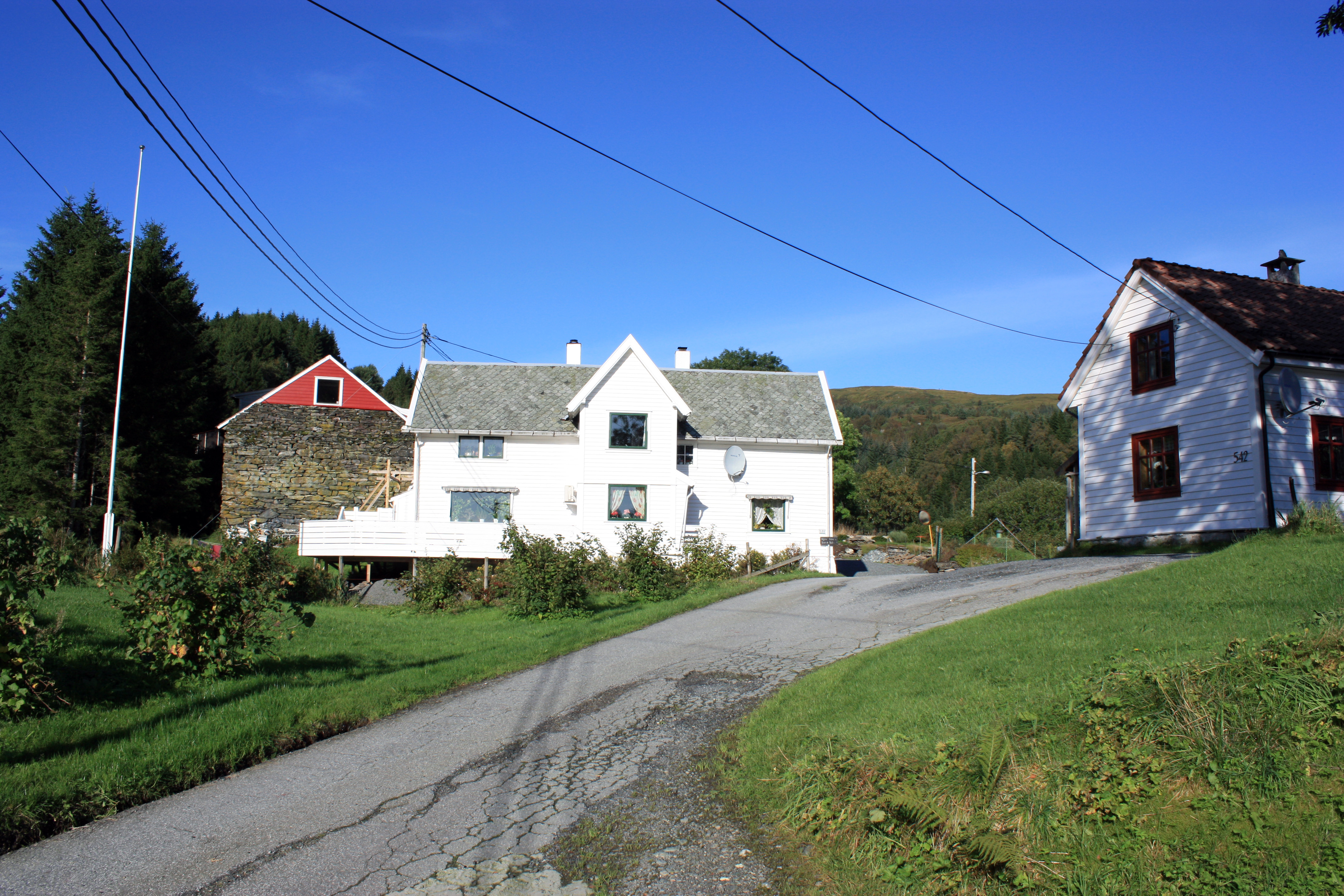 Riple, Fana, Bergen.